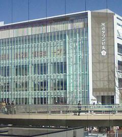 撮影日：2007年12月6日 撮影地：JR青梅線河辺駅構内から撮影 撮影者：投稿者本人